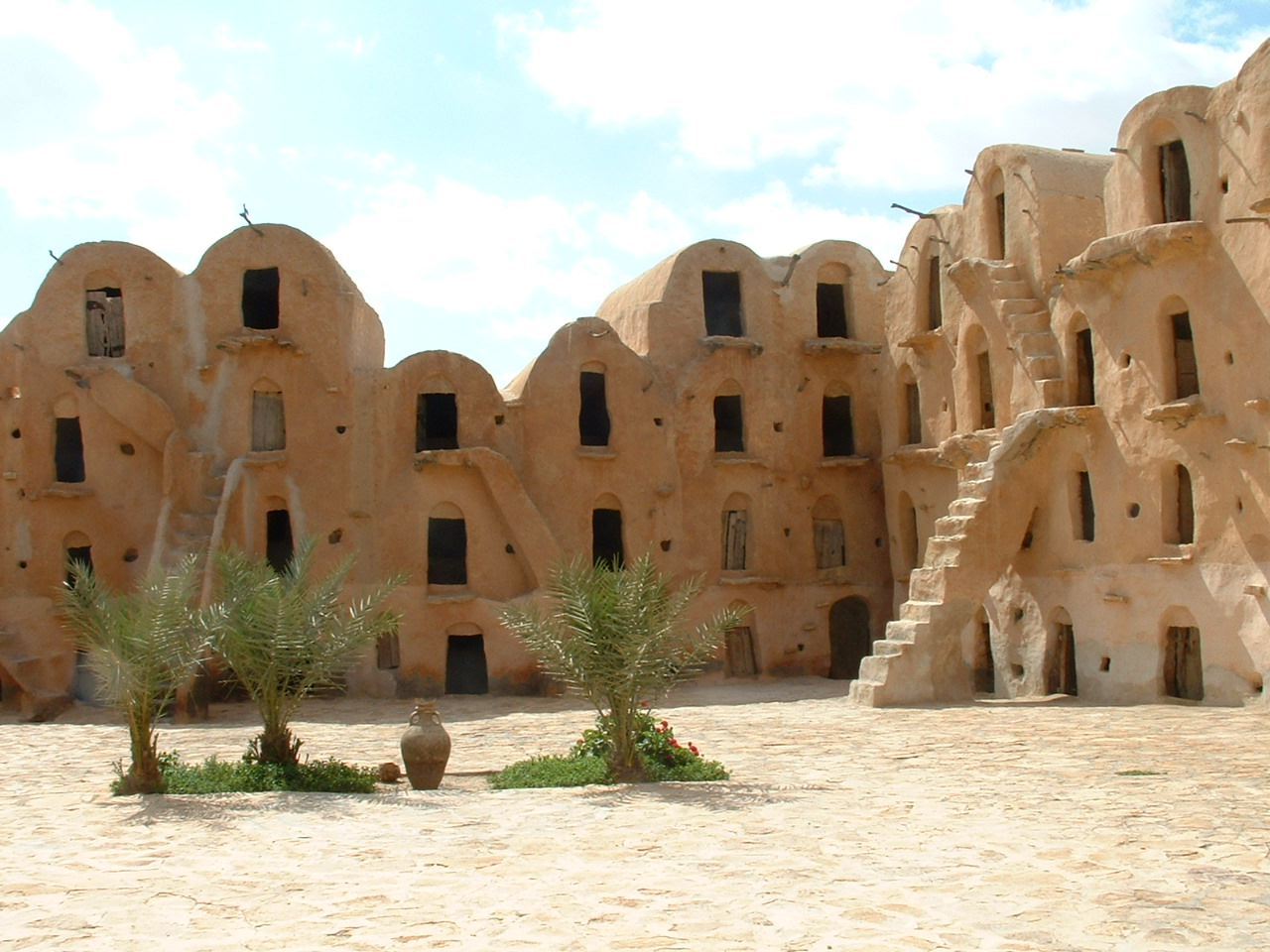 Ksar Ouled Soltane en Tunisie